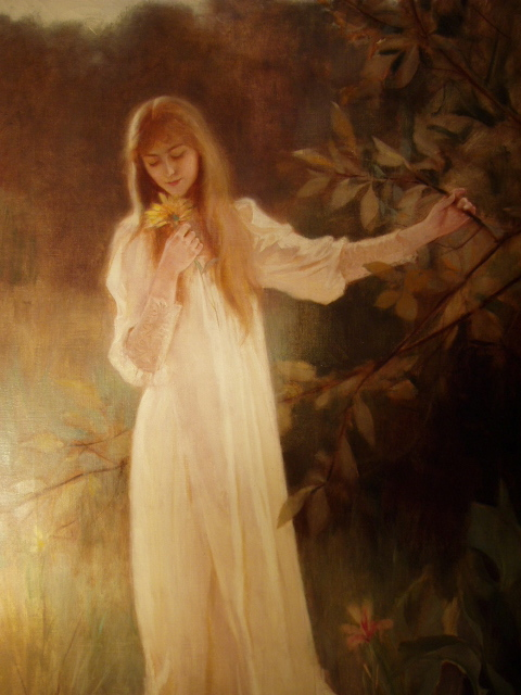 Jeune femme tenant des fleurs, tableau d'Albert Lynch